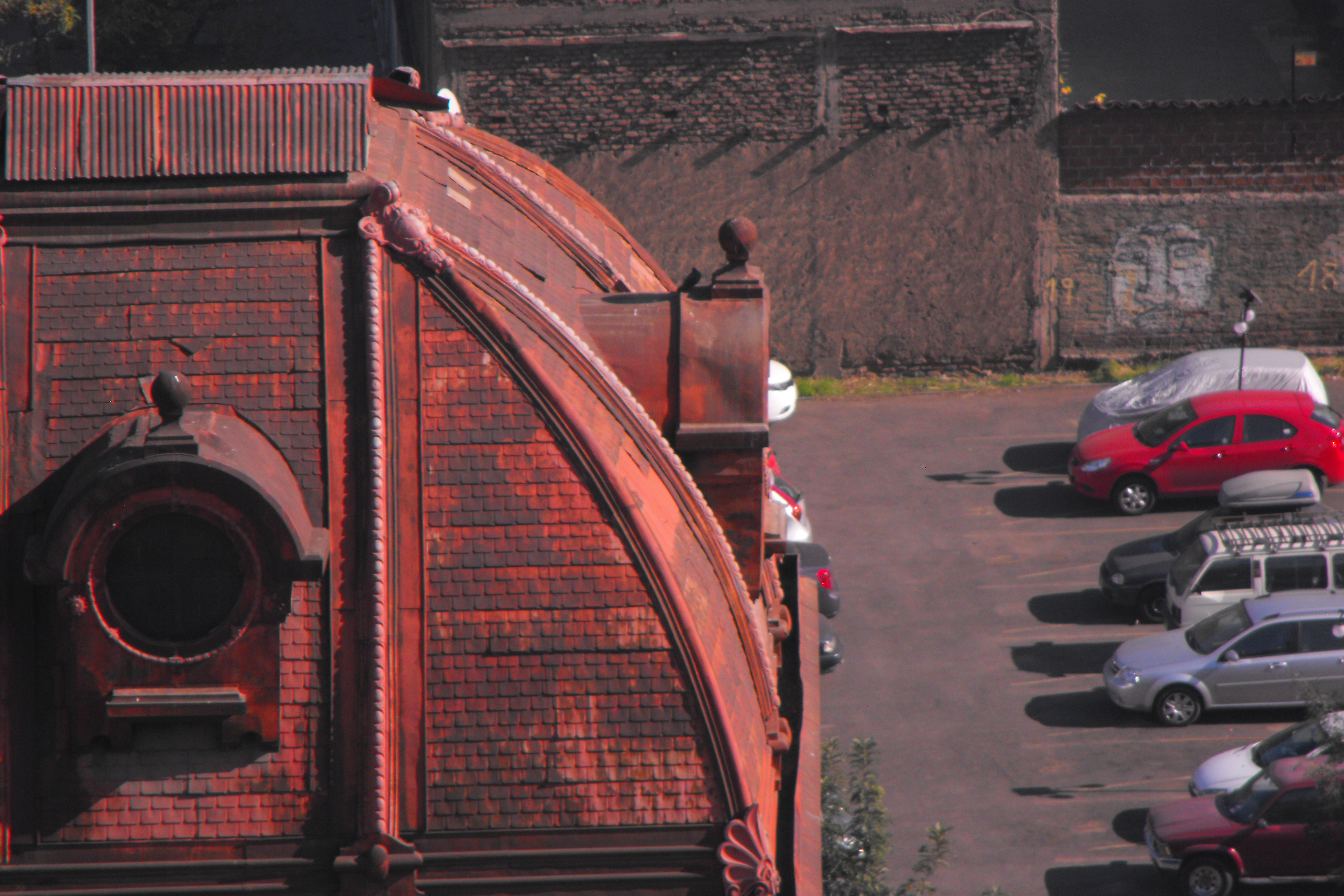 Cupula Iglesia San Isidro Labrador